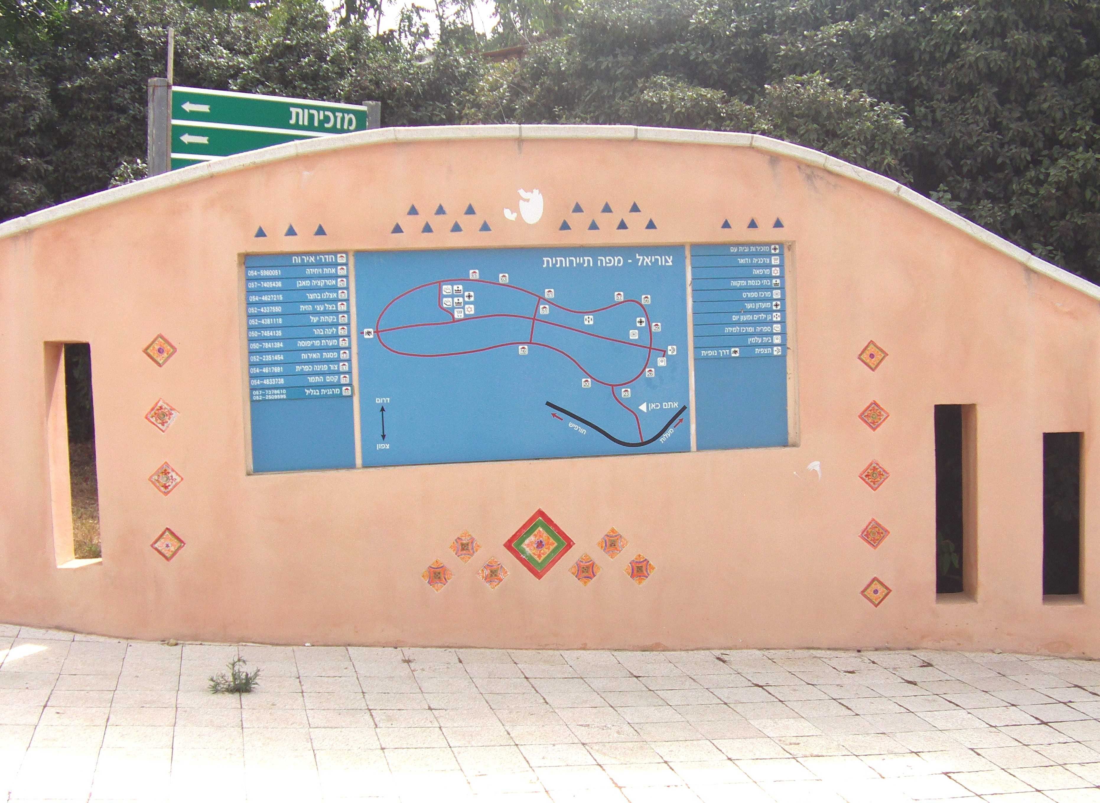 אוטובוסים של מועצות איזוריות מפה תיירותית